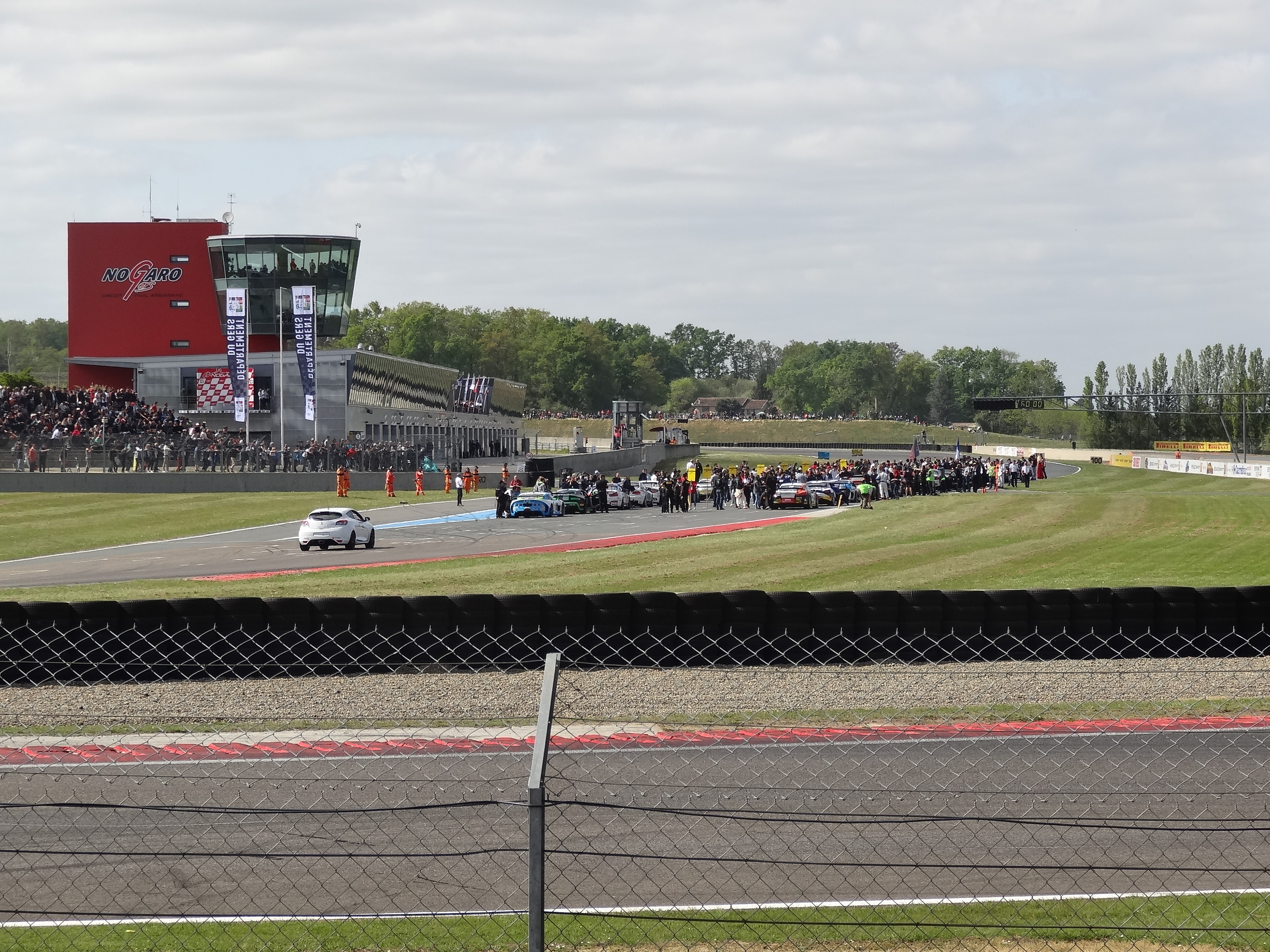 Championnat de France FFSA GT 2017 à Nogaro.